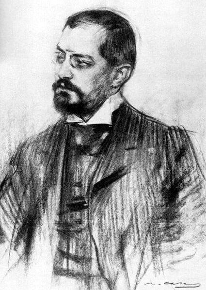 Josep Puig i Cadafalch